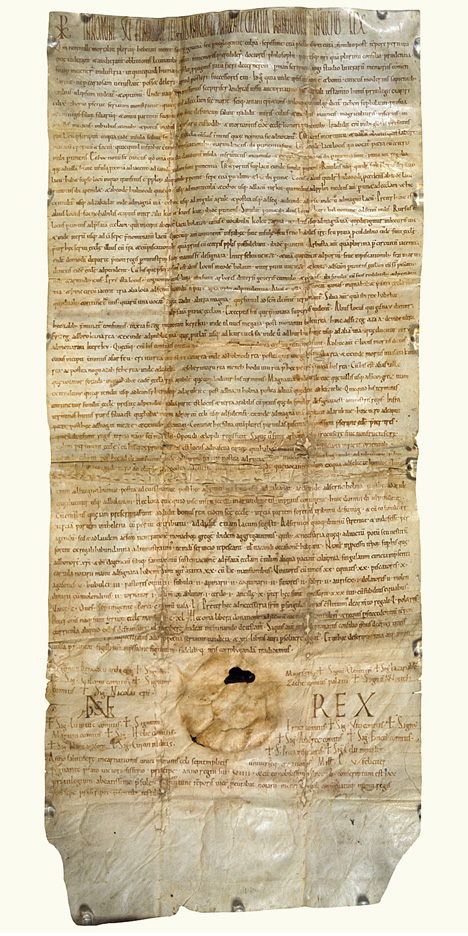 A tihanyi apátság alapítólevele Pannonhalmi Bencés Főapátság, Főapátsági Levéltár